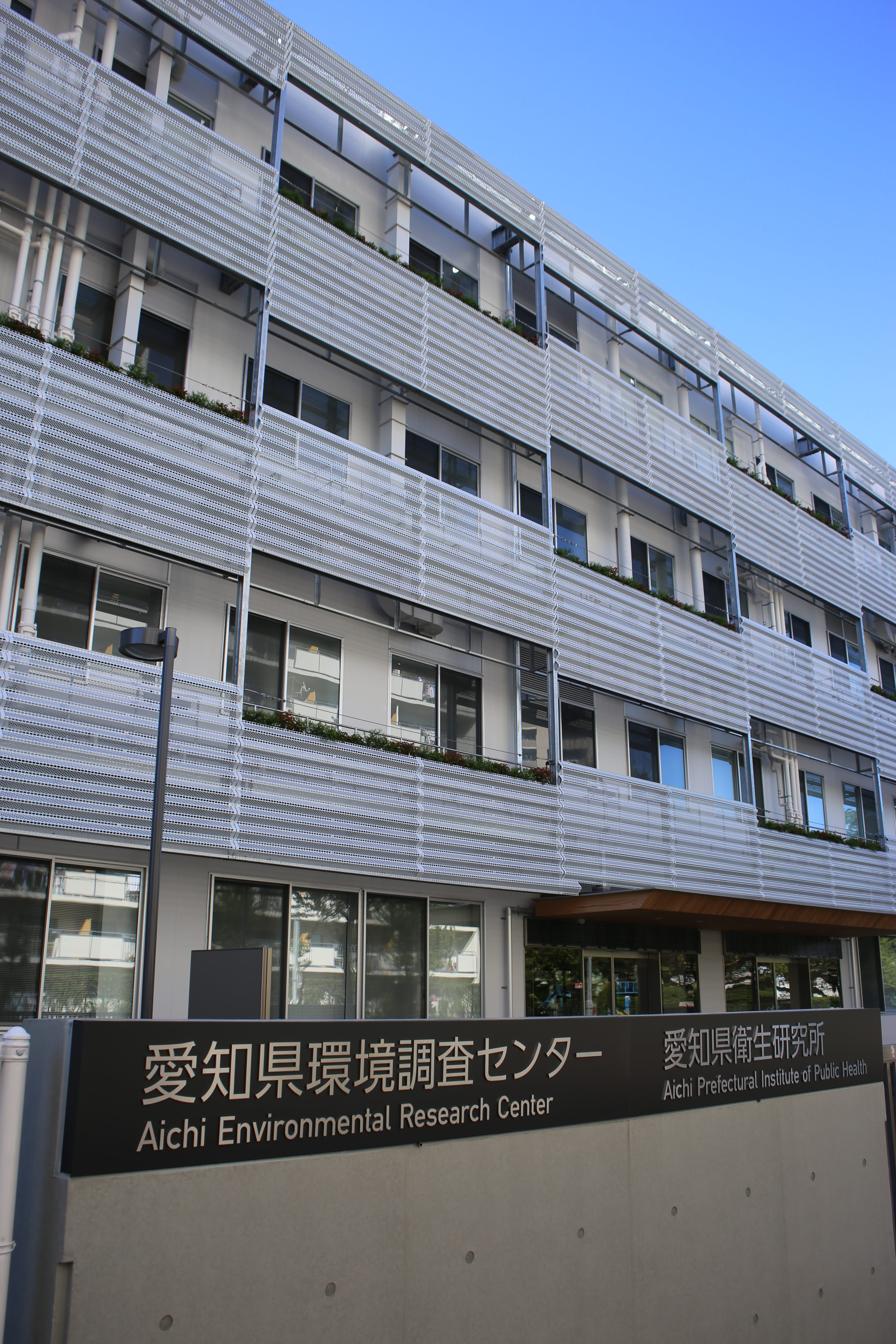 名古屋市北区辻町字流 愛知県環境調査センター 愛知県衛生研究所